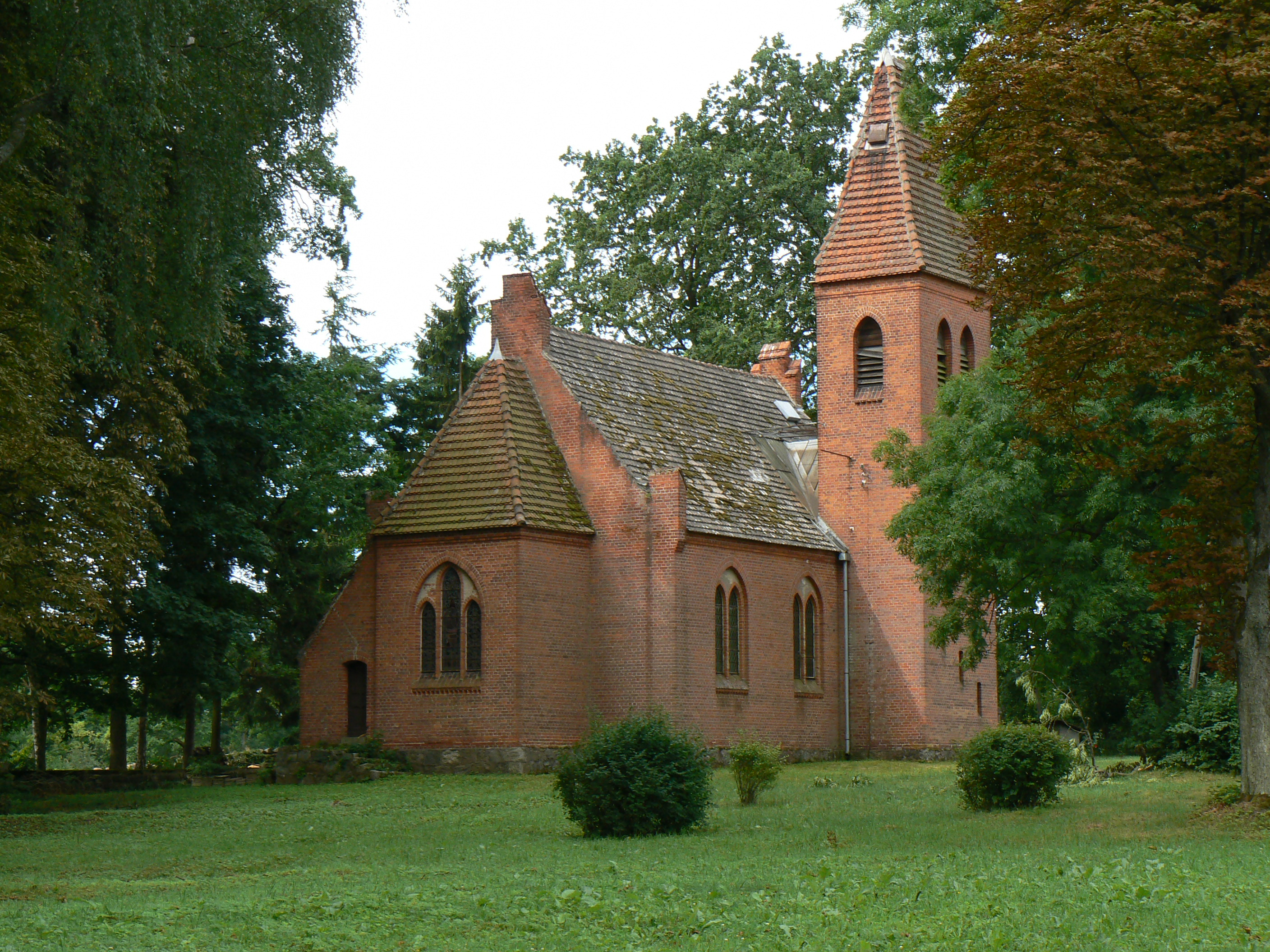 Jastrzębniki - dawna kaplica w zepole pałacowym, ob. rzymskokatolicki kościół filialny p.w. Wniebowzięcia NMP, 1903